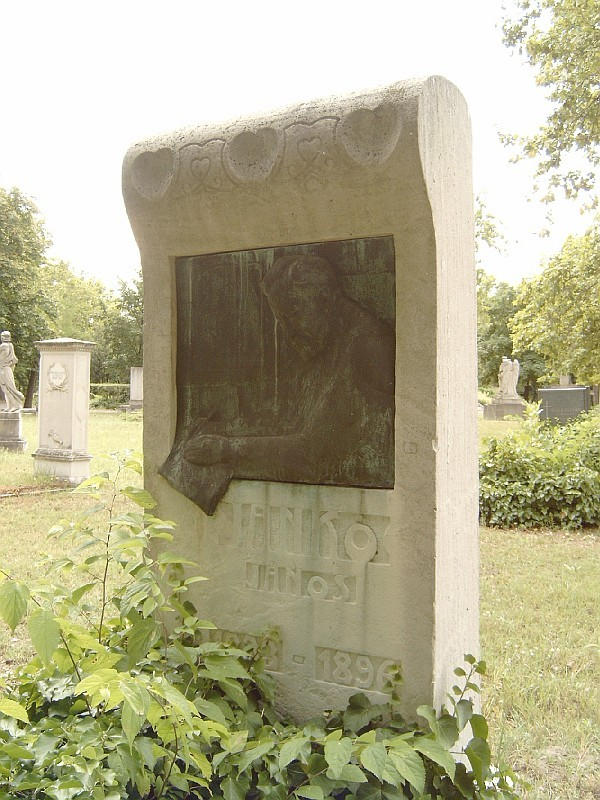 id. Jankó János sírja Budapesten. Kallós Ede (1866–1950) szobrászművész és Márkus Géza (1872–1912) alkotása. (lásd: Budapesti Negyed 1999/3) Kerepesi temető: 11-1/a-25.